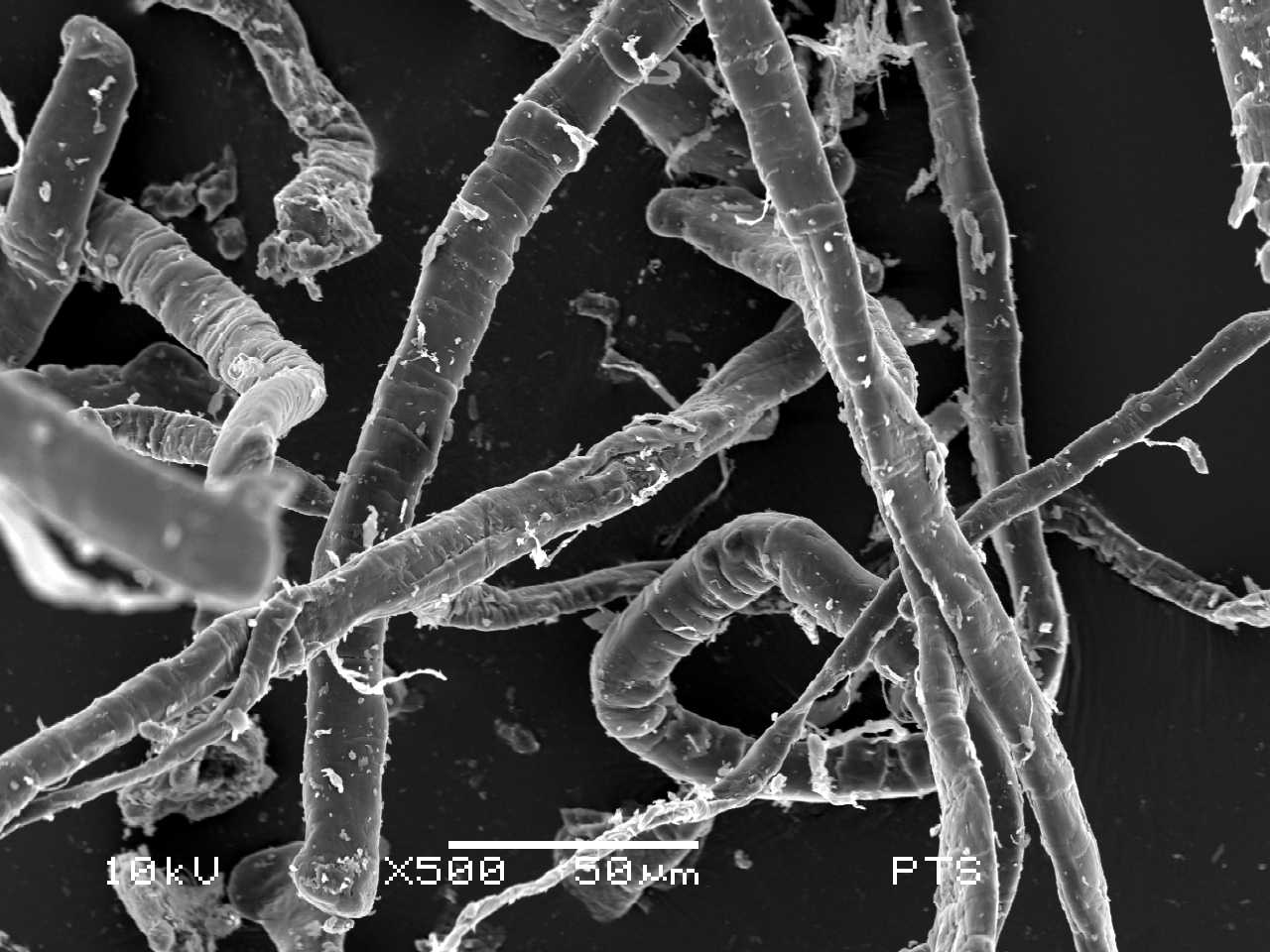 nicht fibrillierte Naturfaser (Hanf)